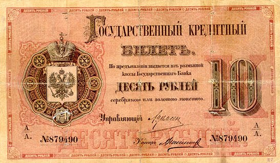 10 рублей 1882. Аверс.